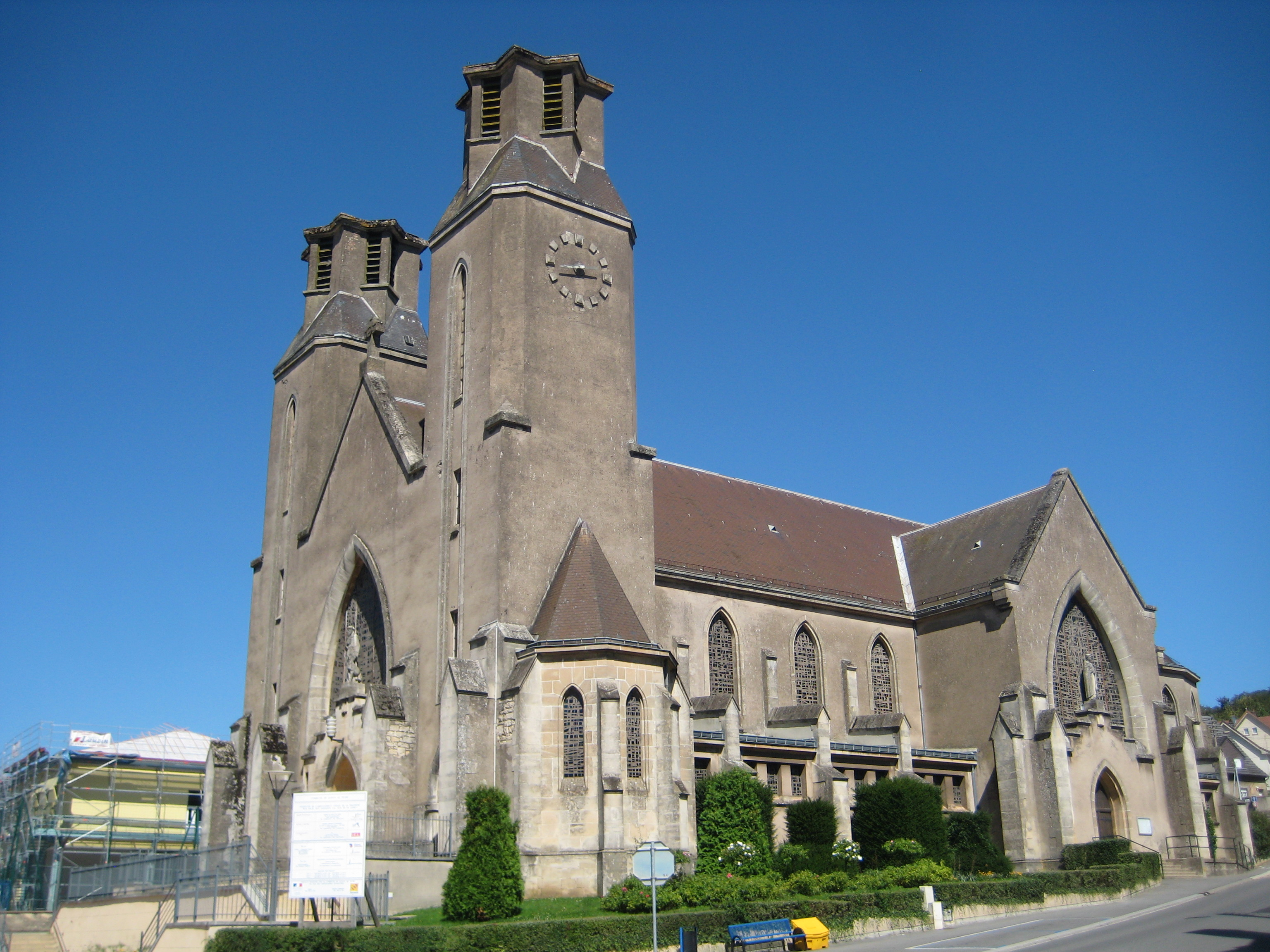 Audun-le-Tiche (Moselle, France) : L'église Saint-François-d'Assise.